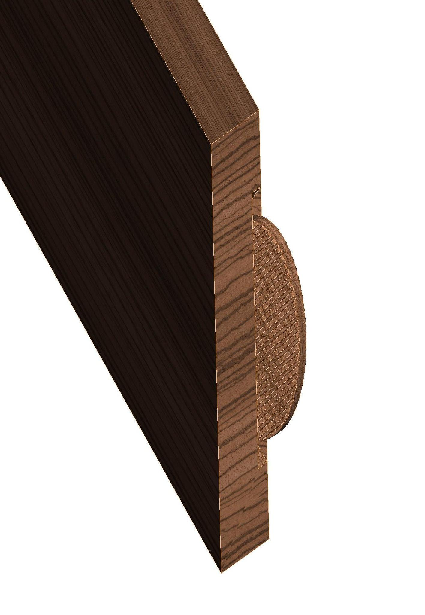 Holz-Eckverbindungen auf Gehrung verleimt mittels Lamello siehe auch Holzverbindung.